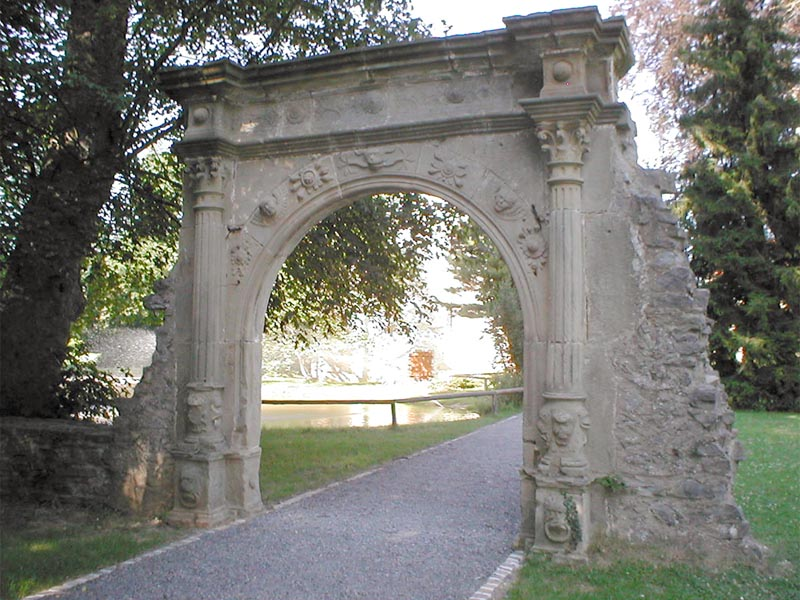 Prachttor im Schlosspark Neckarbischofsheim